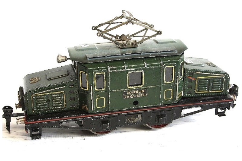 Märklin Tinplate Volkskrokodil RV 66/12920, Spur 0, eine vereinfachte Nachamung einer grünen Ce 6/8 I und Ce 6/8 II der Schweizerischen Bundesbahn (SBB).